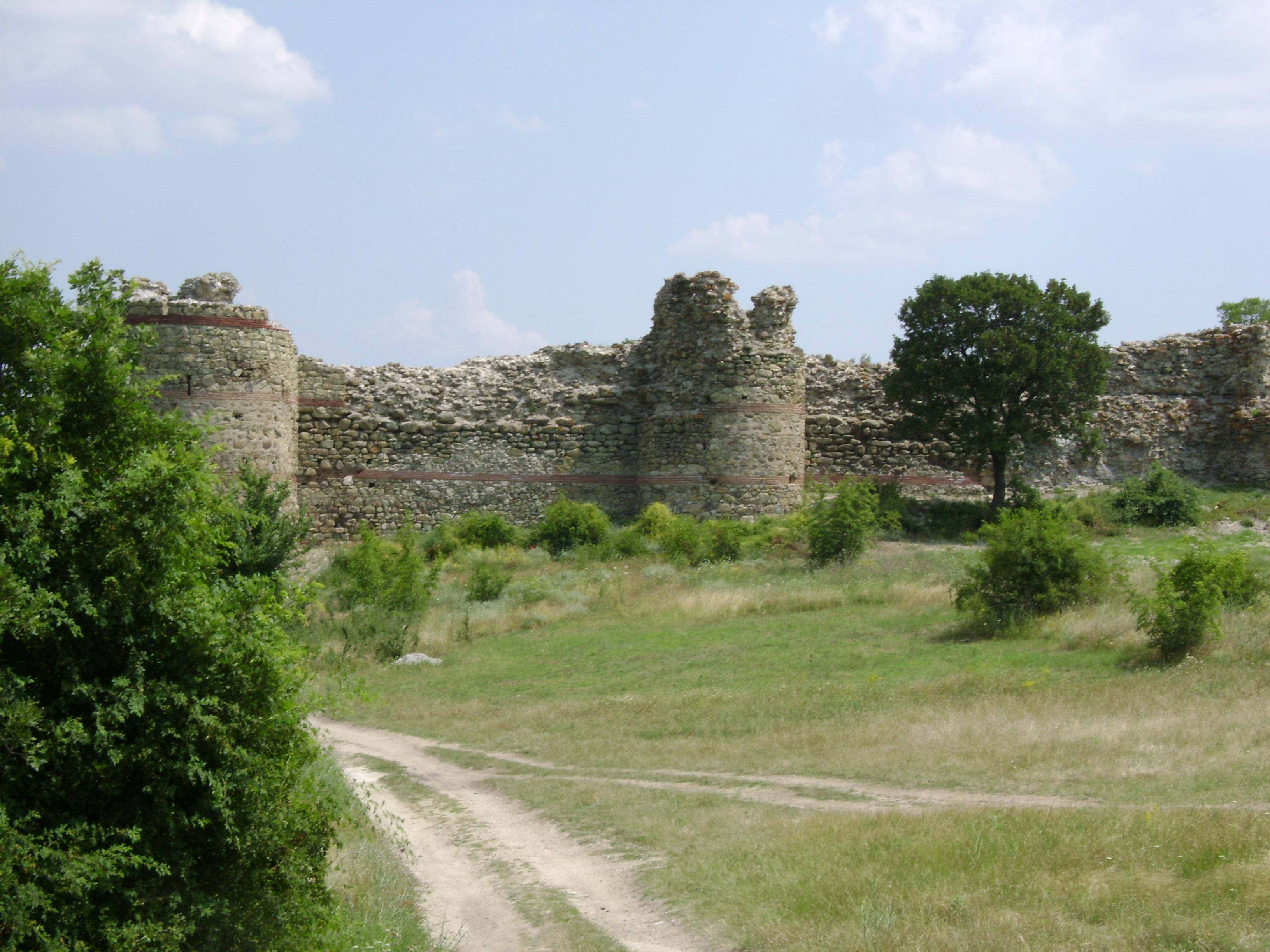 Крепост над село Мезек